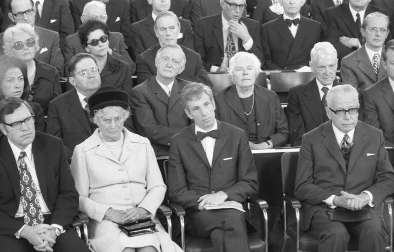 Der Vorsitzende des Börsenvereins des Deutschen Buchhandels überreicht in der Paulskirche den an Janusz Korczak verliehenen Friedenspreis 1972 an den Vorsitzenden des Korczak-Komitees Wladimir Rogalski. (Mitte vorne: Prof. Hartmut von Hentig, links von ihm: Frau Heinemann, ganz rechts: Dr. G. Heinemann)